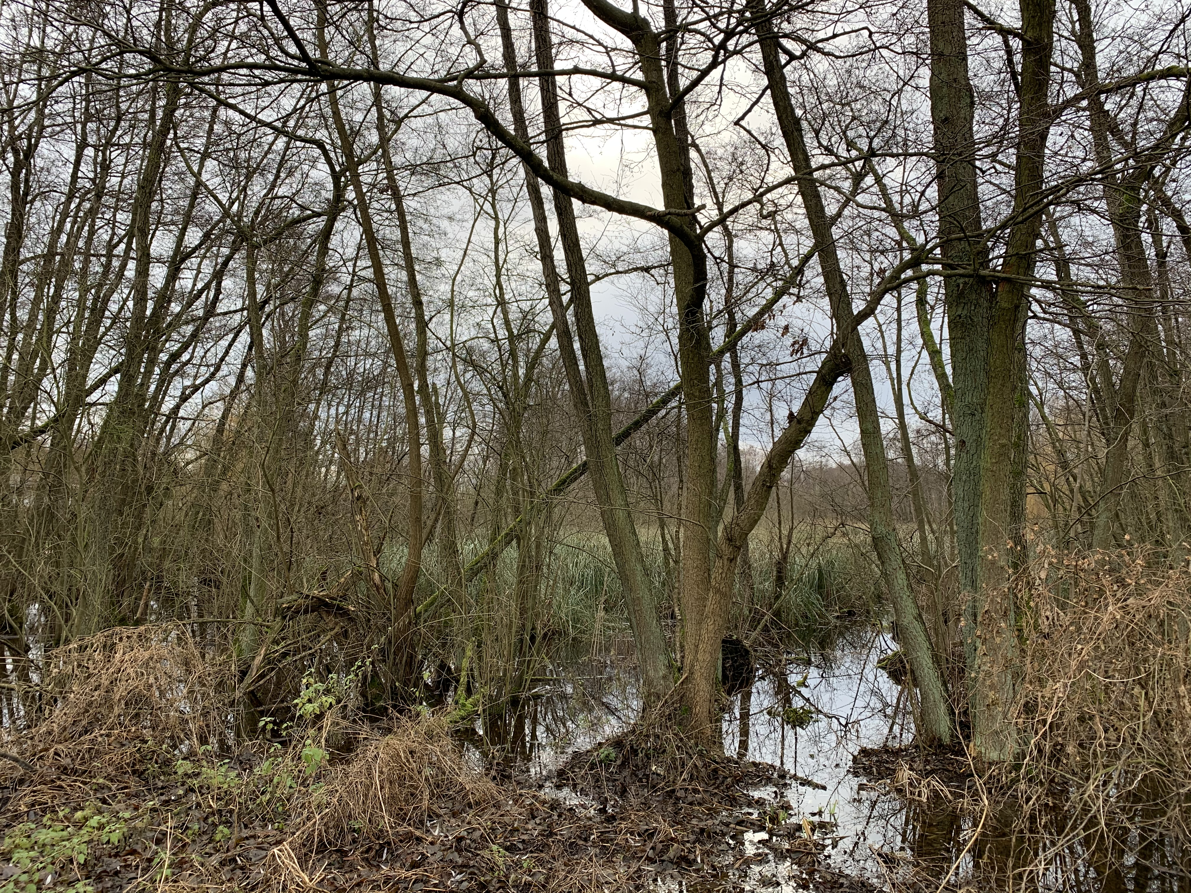 Postbruch, ein Wohnplatz der Stadt Strausberg in Brandenburg